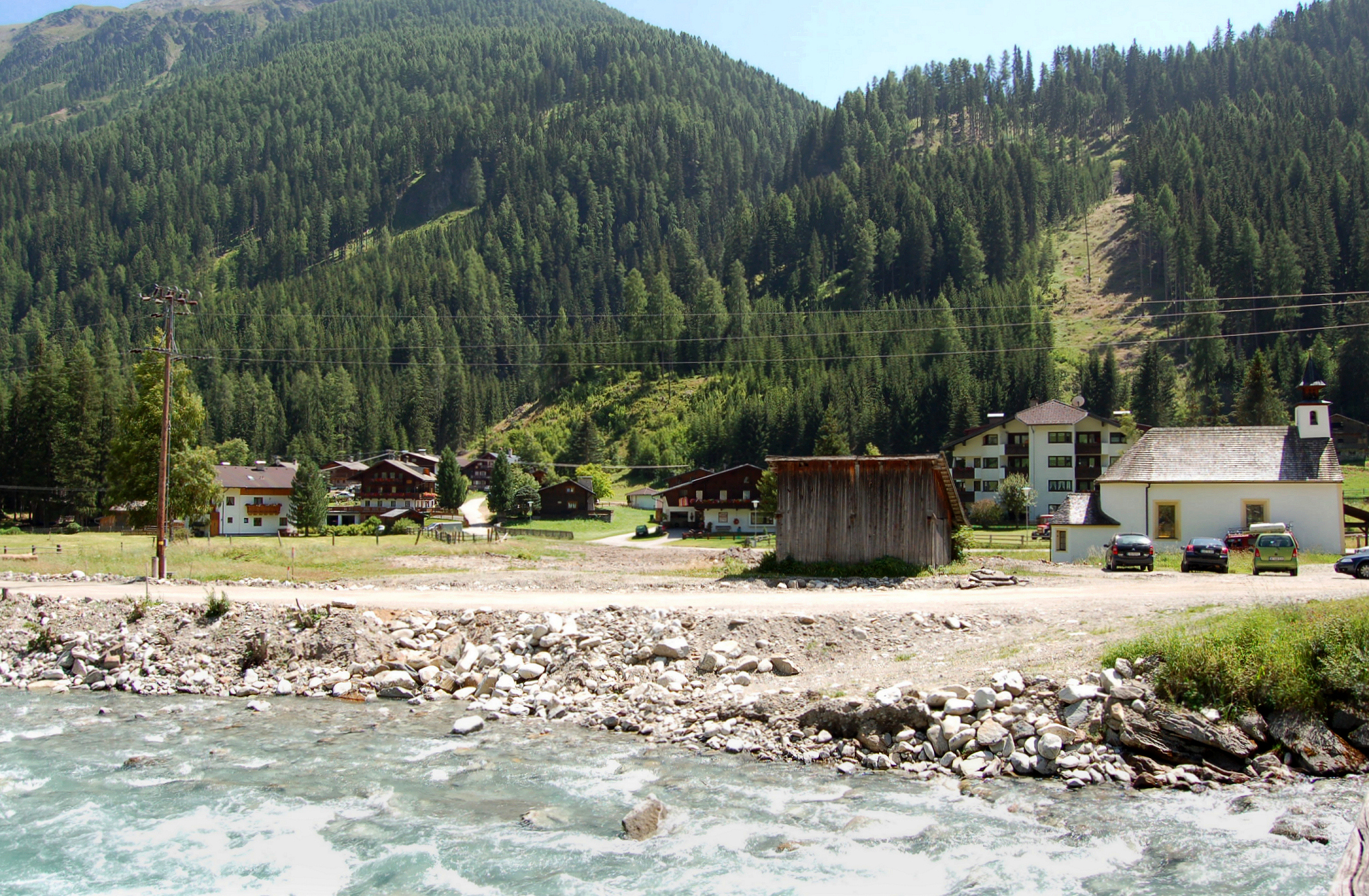 Das Dorf Rinderschinken in der Gemeinde St. Jakob in Defereggen